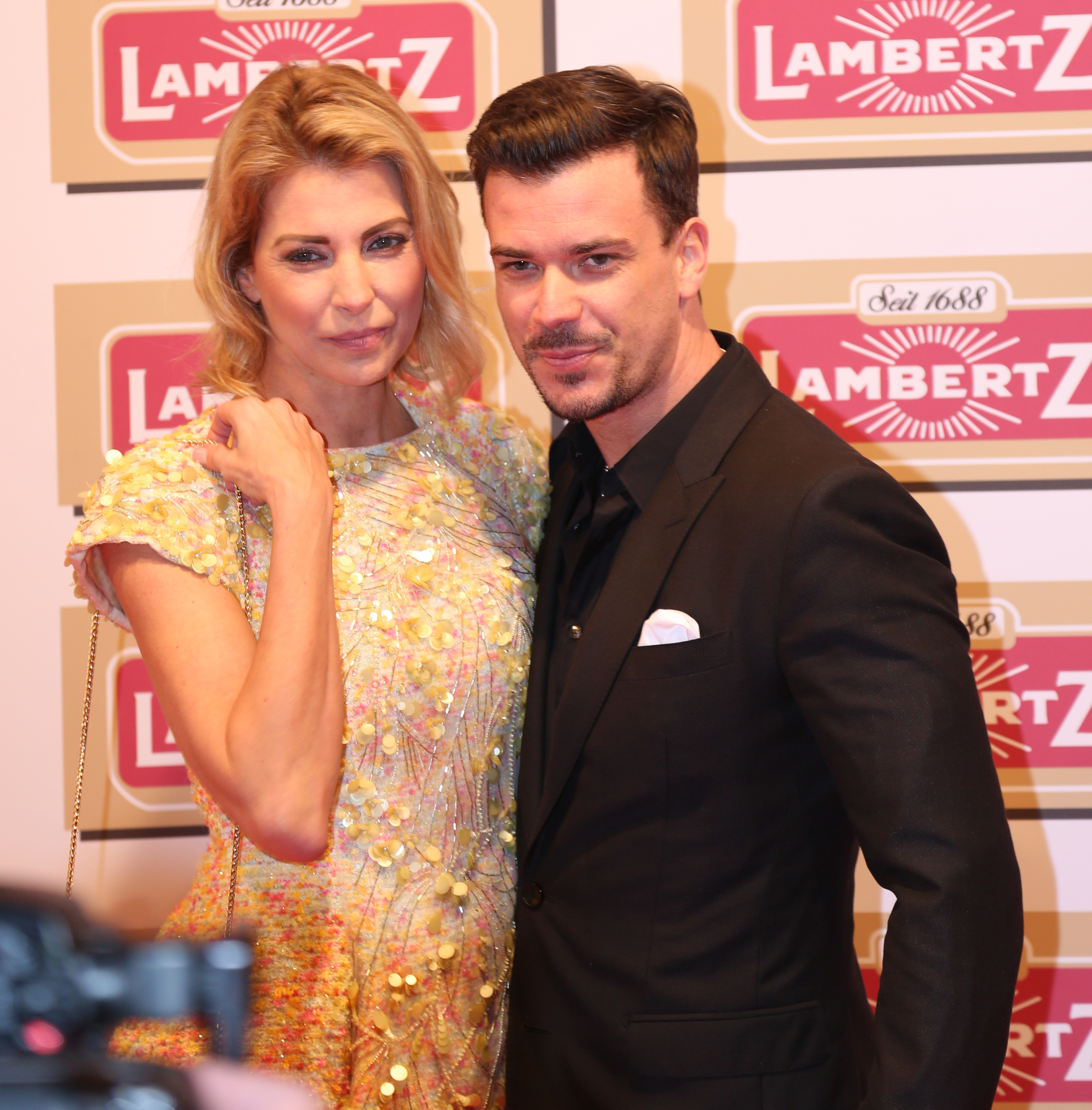 Giulia Siegel mit ihrem Freund Ludwig Heer bei der Lambertz Monday Night 2017.